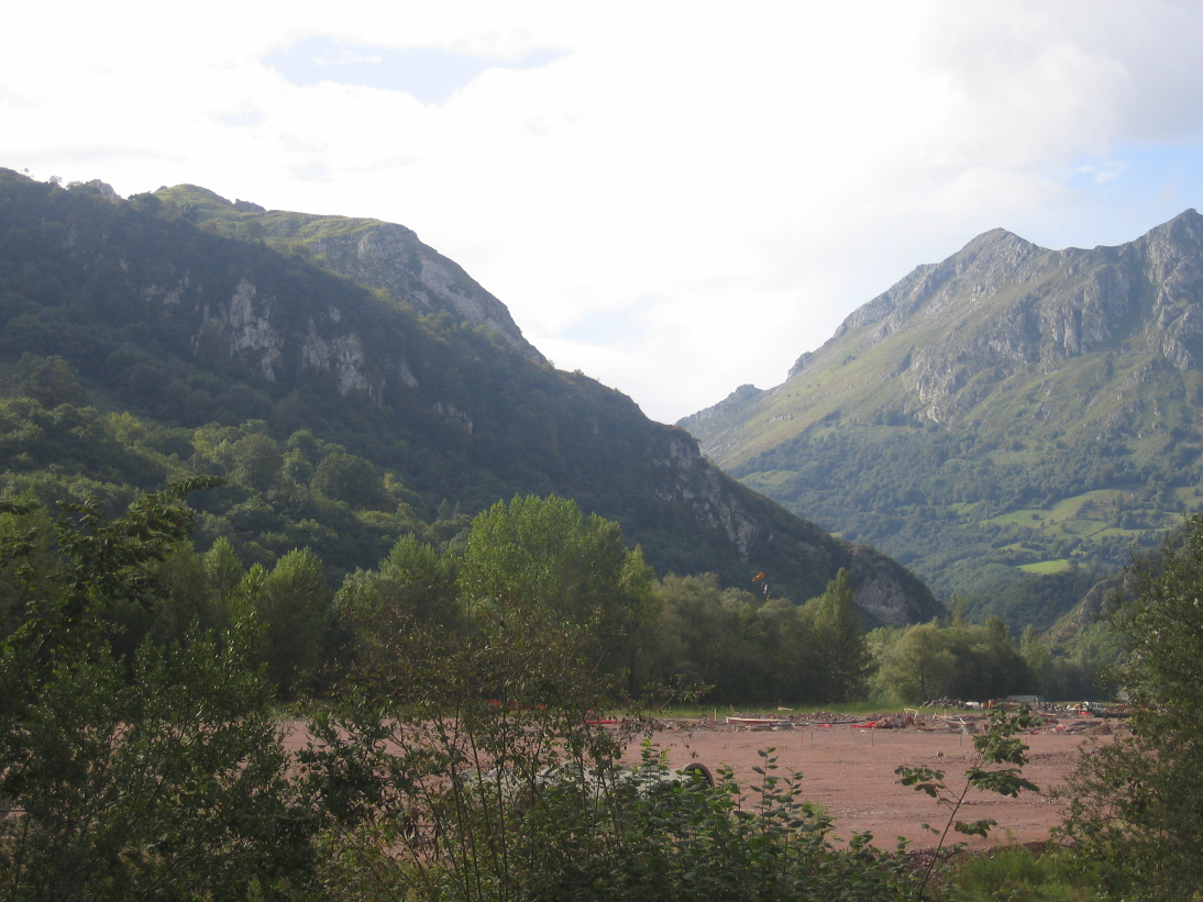 Paisaje de Morcín visto desde la localidad de Argame. A la derecha se puede observar el Monsosacro, o la Madalena conocida popularmente y a la izquierda se puede observar el Picu El Gatu.